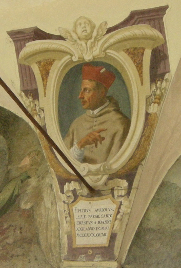 Chiostro di ognissanti, personalità francescane 19 pietro orioli